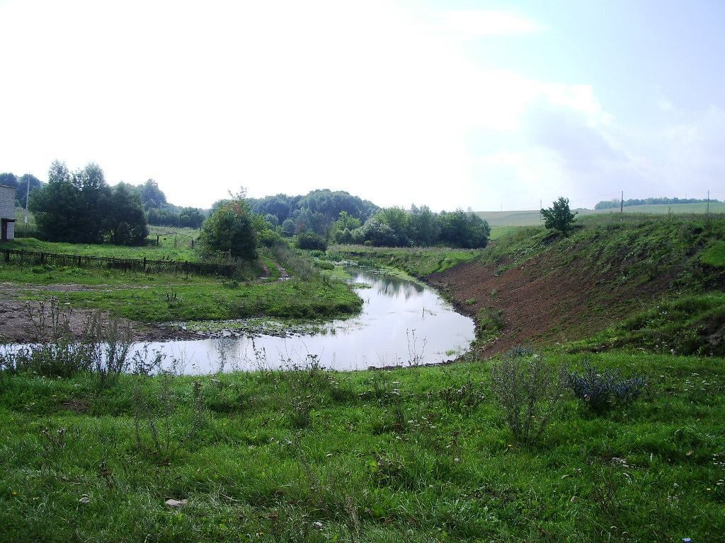 Ельчик-река в Липецкой области